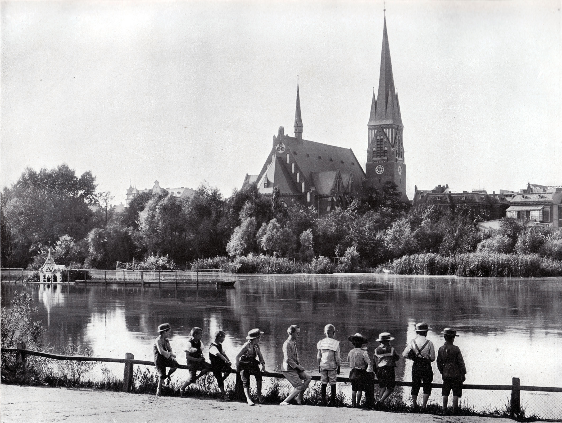 Berlin-Wilmersdorf, Ansicht um 1900. Wilmersdorfer See und Dorfkirche (Auenkirche)